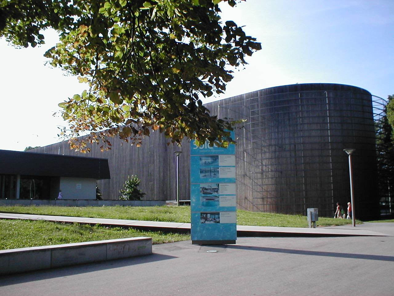 APCOA Parkhaus am Bollwerksturm, Beispiel für öffentliche Gegenwartsarchitektur in Heilbronn